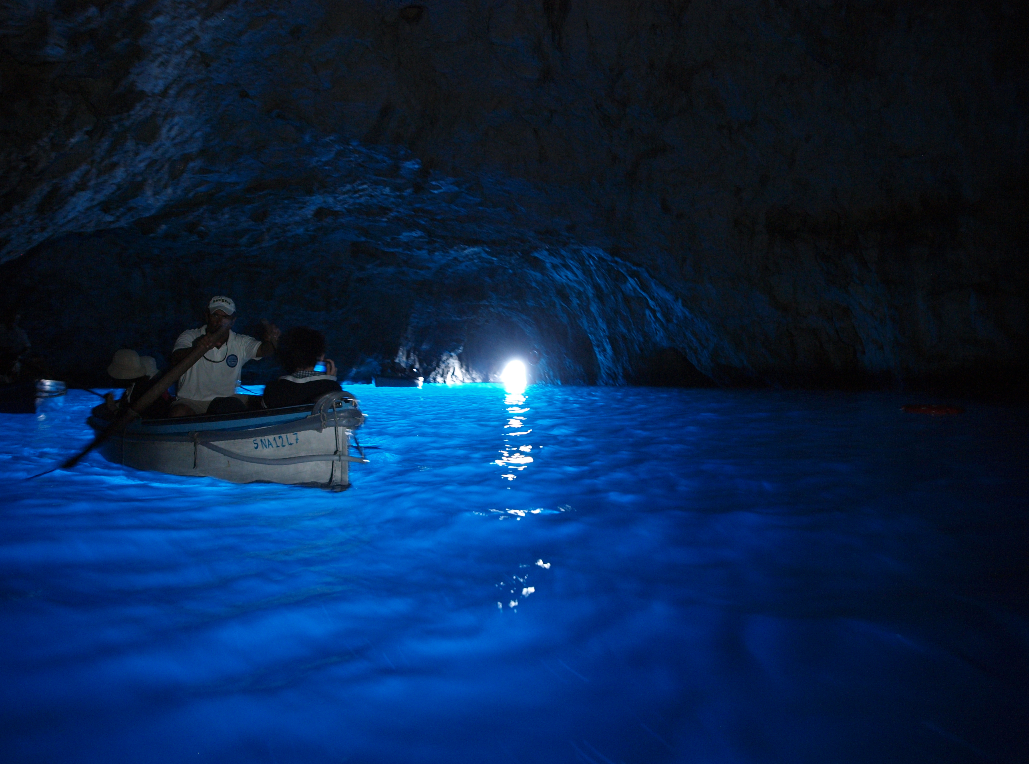 Blue Grotto , Capri , Naples , Campania , Italy